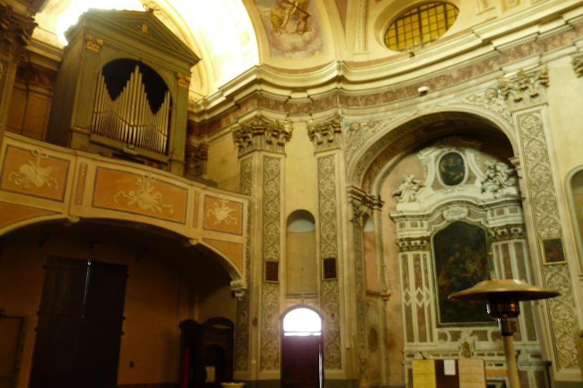 Chiesa di San Pietro, Diano San Pietro, Liguria, Italia